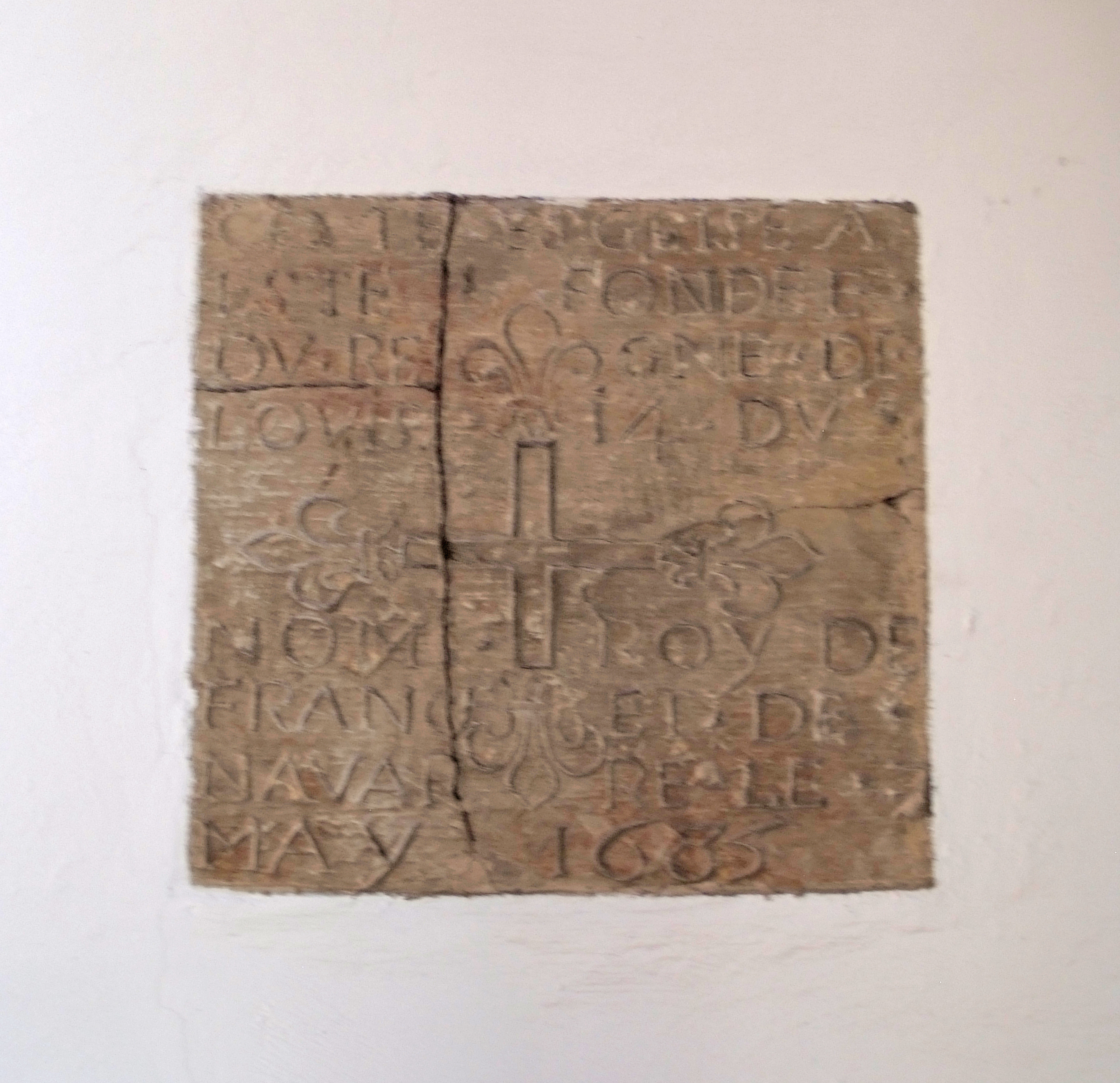 St. Ludwig (Saarlouis), Grundstein